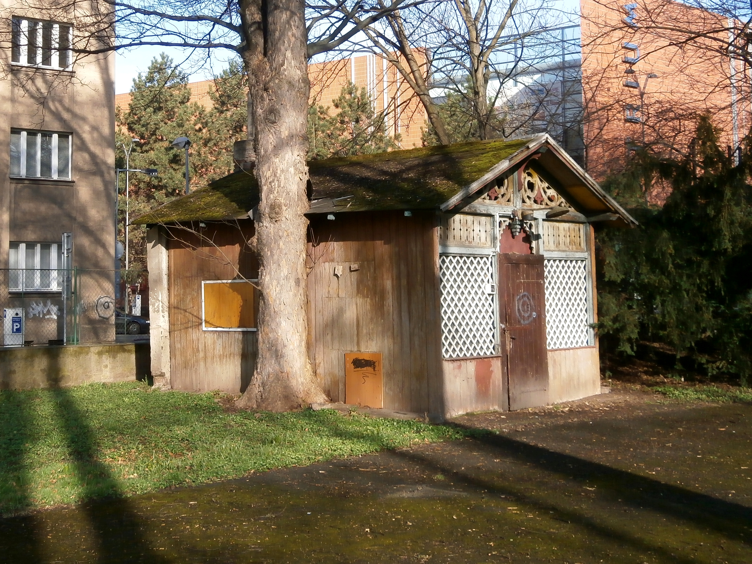 Zahradní domek u KD Střelnice (Hradec Králové)